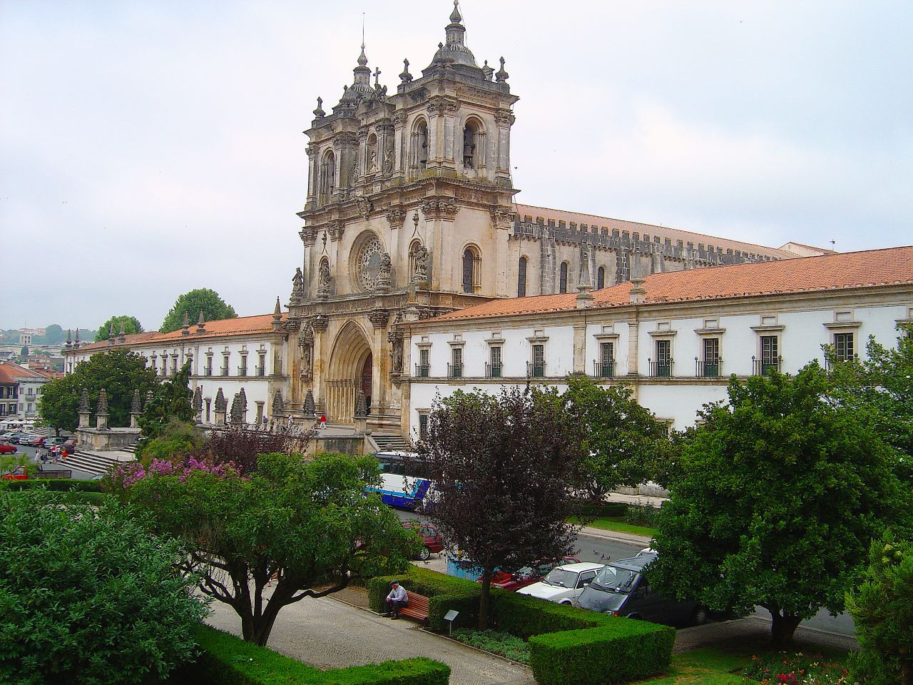 Panorama 360º